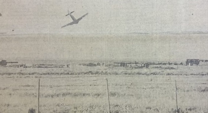 Azules y colorados - Avión Mk.IV Gloster Meteor de la Fuerza Aérea (Azul) ataca Base Aeronaval de Punta Indio (Colorados). La Nación, 4 de abril de 1963